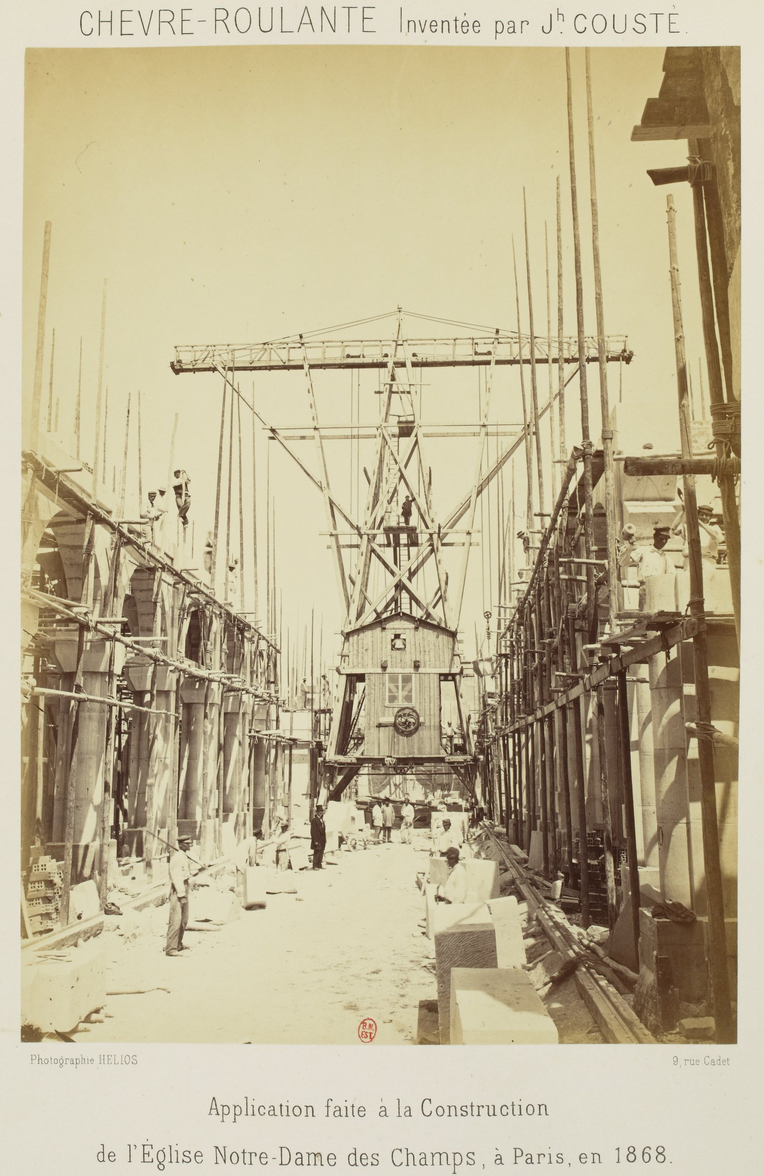 Chèvre roulante (machine élévatoire pour les constructions, inventée par JH Cousté), oeuvrant dans l'Eglise Notre-Dame-des-Champs à Paris en 1868